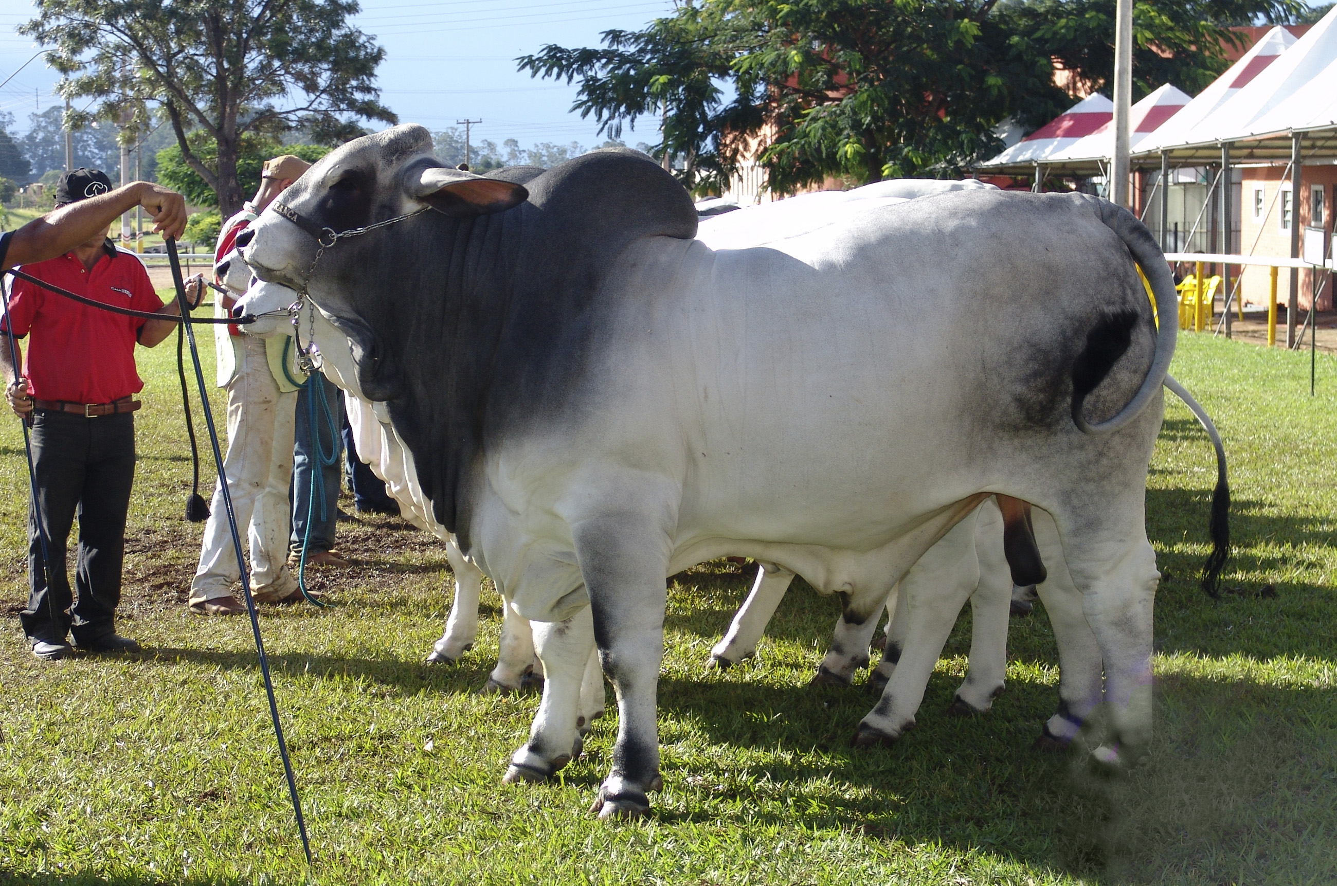 Touro da raça Brahman, em julgamento na EMAPA, Avaré, São Paulo, Brasil